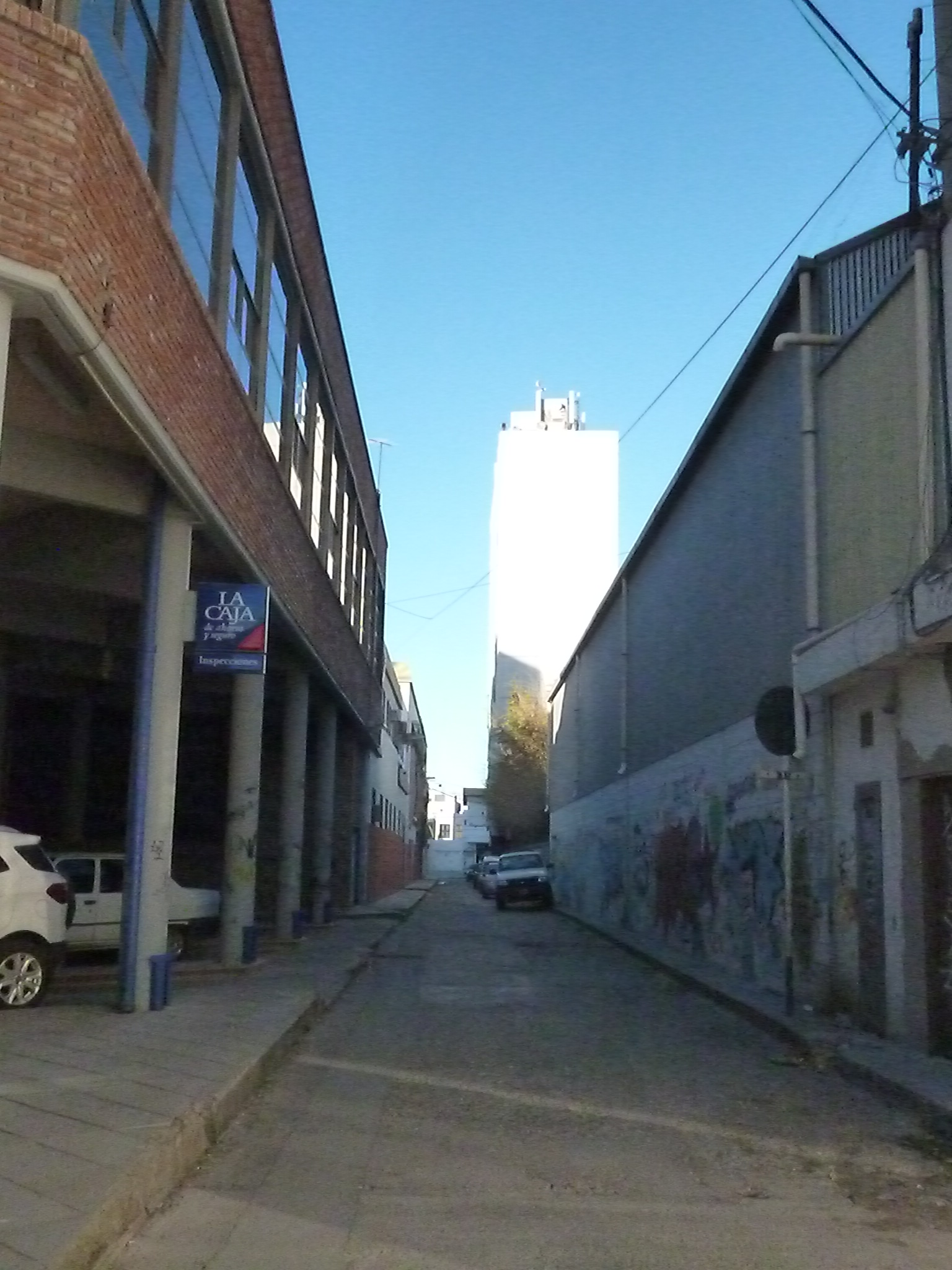 En esta calle se encontraba el antiguo barrio ferroviario en Trelew